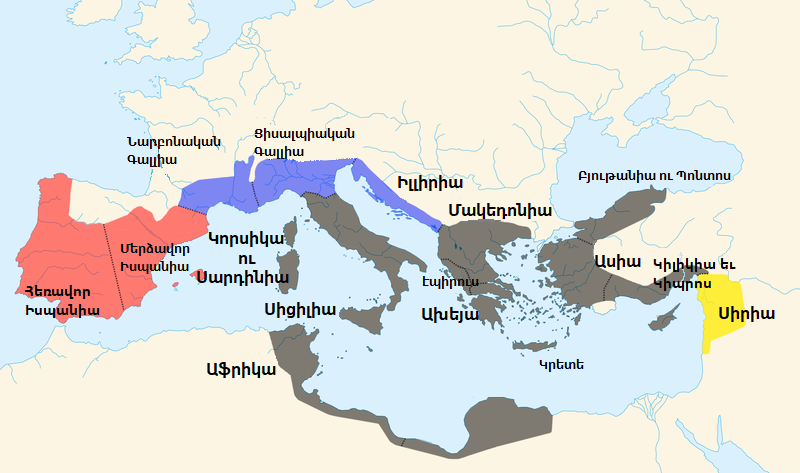 Առաջին եռապետության տարածքները Ք․ա․ 56 թվականին Գնեոս Պոմպեոս՝ Մերձավոր և Հեռավոր Իսպանիաներ Հուիոս Կեսար՝ Գալիա Կիսալպինա, Գալիա Նարբոնենսիս, Իլլիրիա Մարկոս Կրասոս՝ Սիրիա Հռոմեական կայսրության այլ պրովինցիաներ